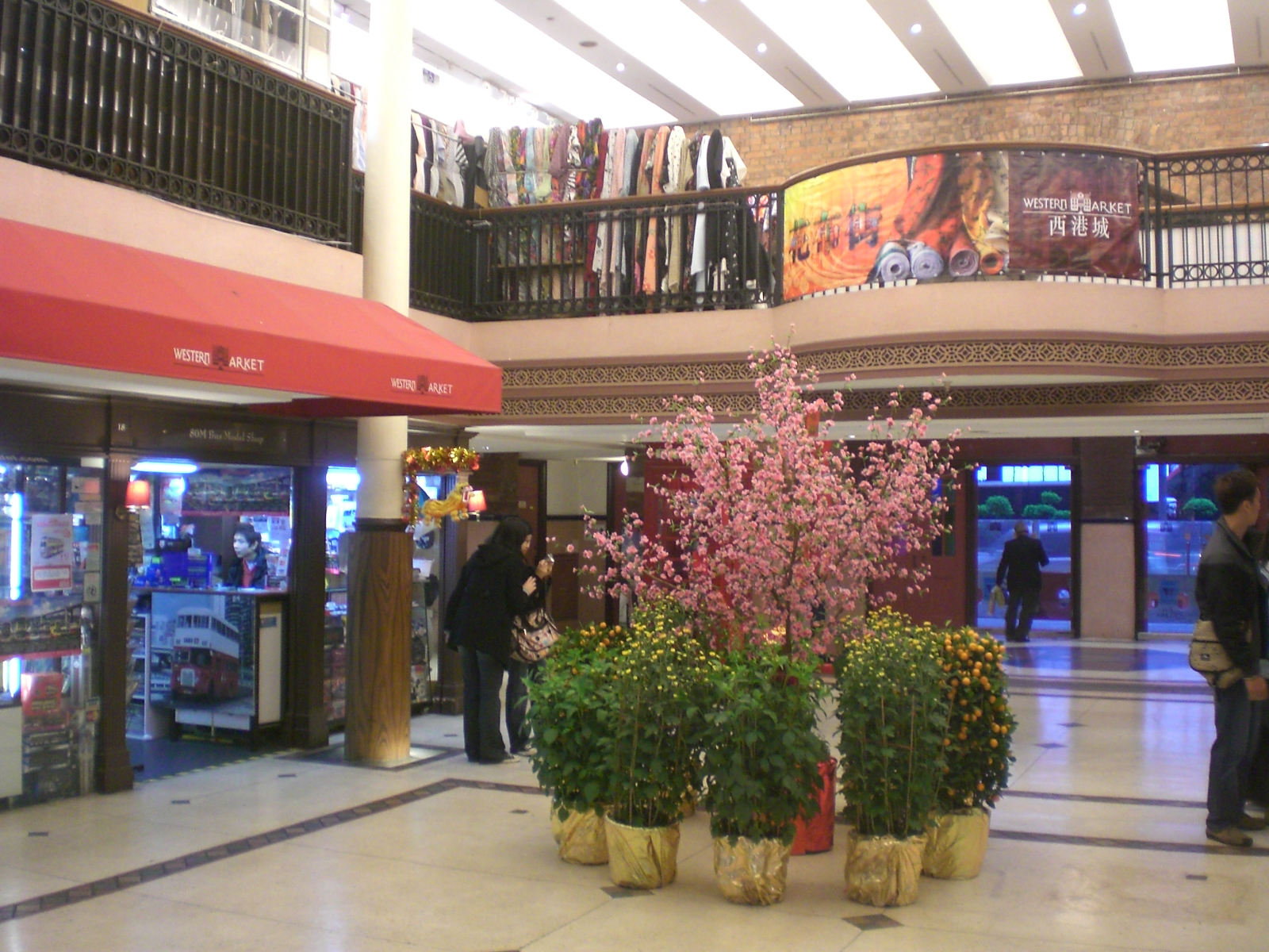 春節年花在西港城, Western Market